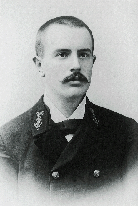 Jan Prins als zeeofficier te Soerabaya (foto: O. Kurkdjian).